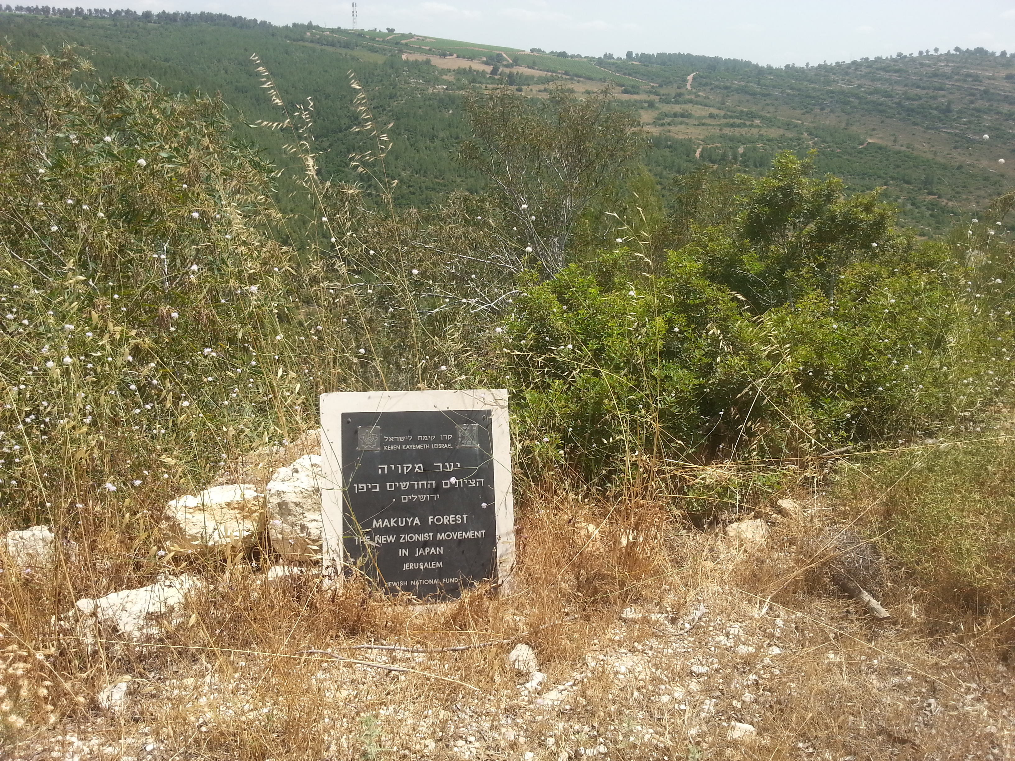 Лес Макуя на дороге Дифенбейкера, Израиль